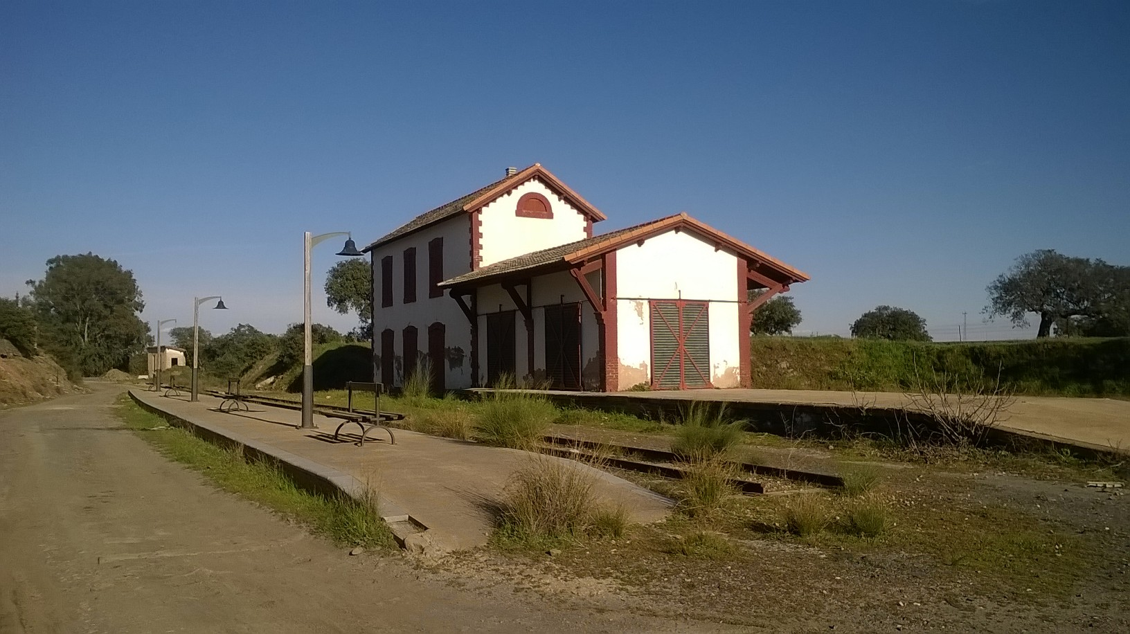 Estación de El Soldado en el término municipal de Villanueva del Duque (Córdoba, España)